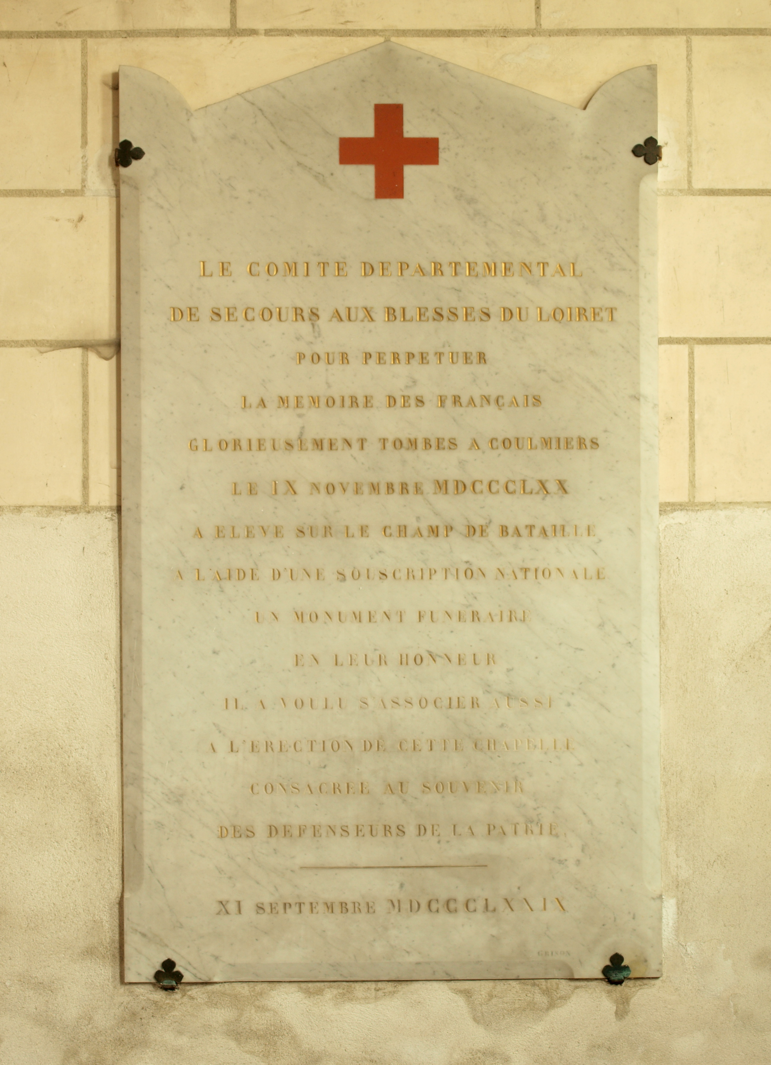 Église Saint-Aignan de Coulmiers (Loiret, France)